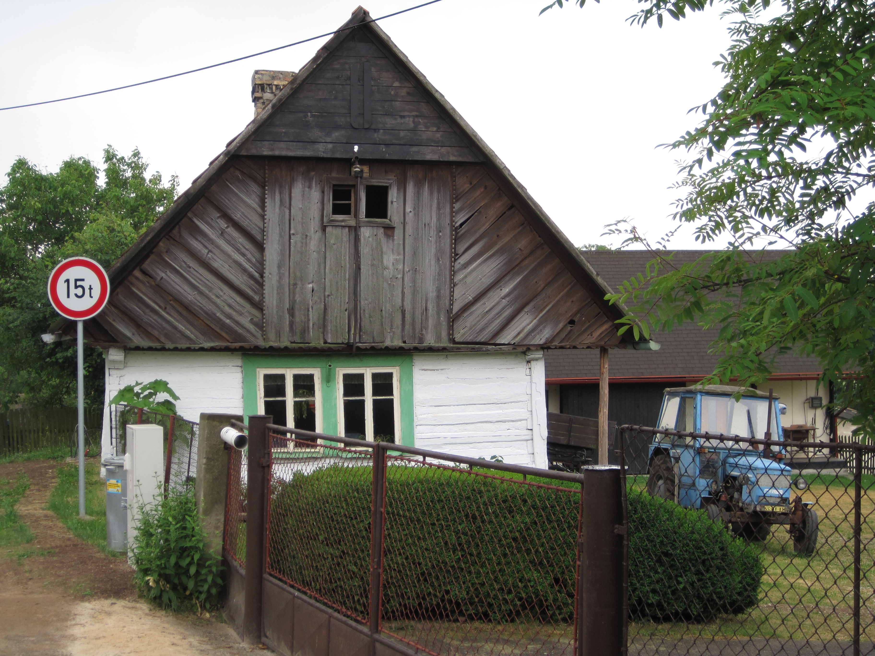 Loveč - chalupa ve vsi